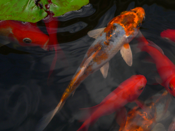 Tagalog: Mga Karpa sa isang dagat-dagatan.